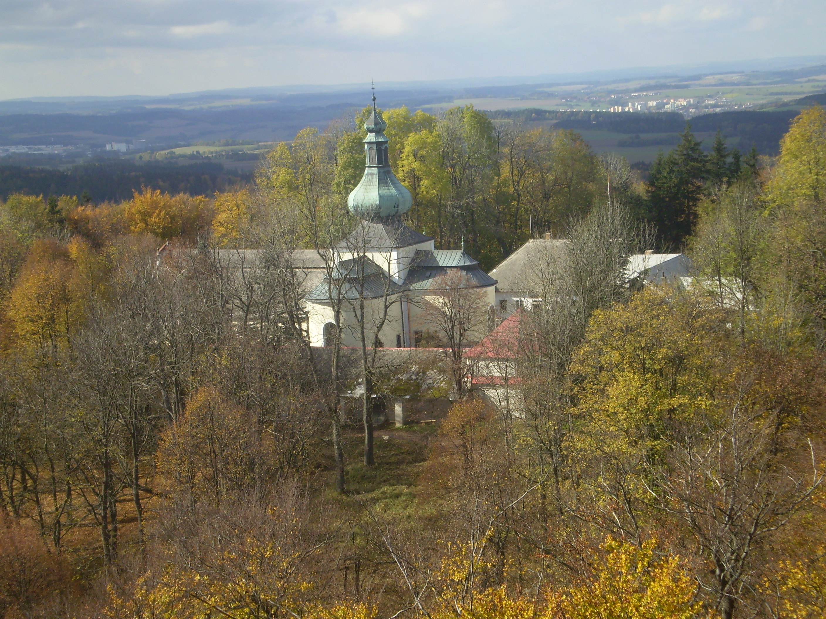 pohled na křemešnický kostel Nejsvětější Trojice z rozhledny Pípalka